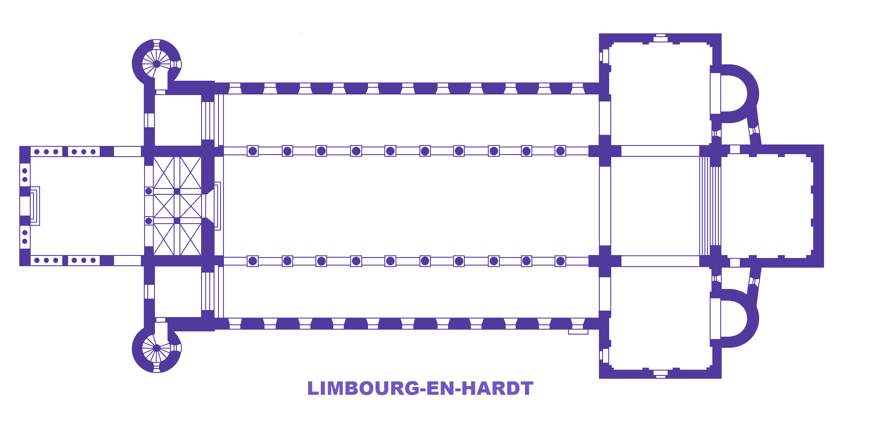 Abbatiale de Limbourg-en-Hardt